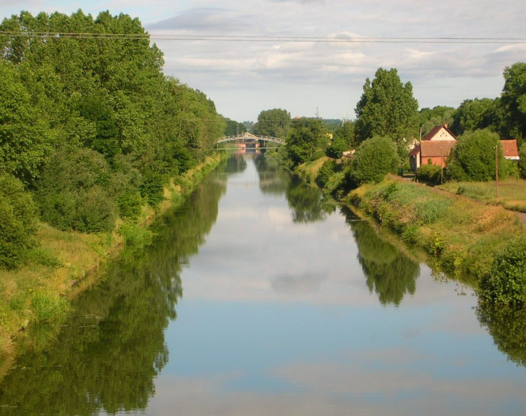 Śluza Prądy kanał bydgoski